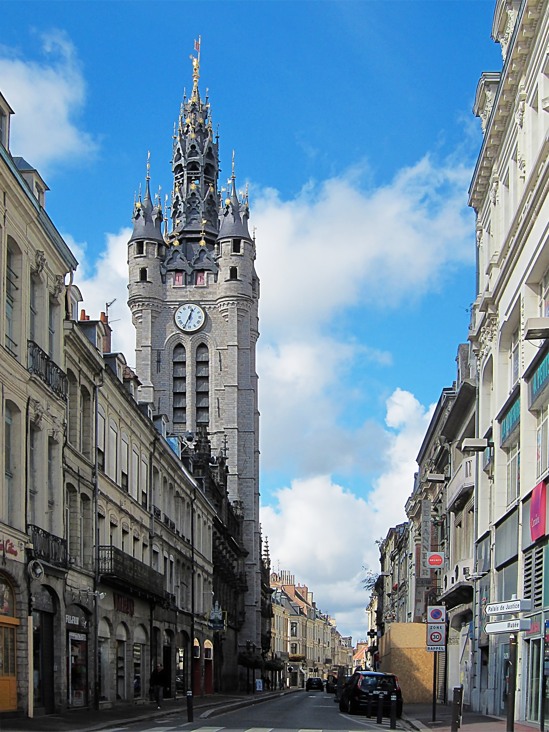 Le beffroi de l'hôtel de ville de Douai vu de la rue de la Mairie. .